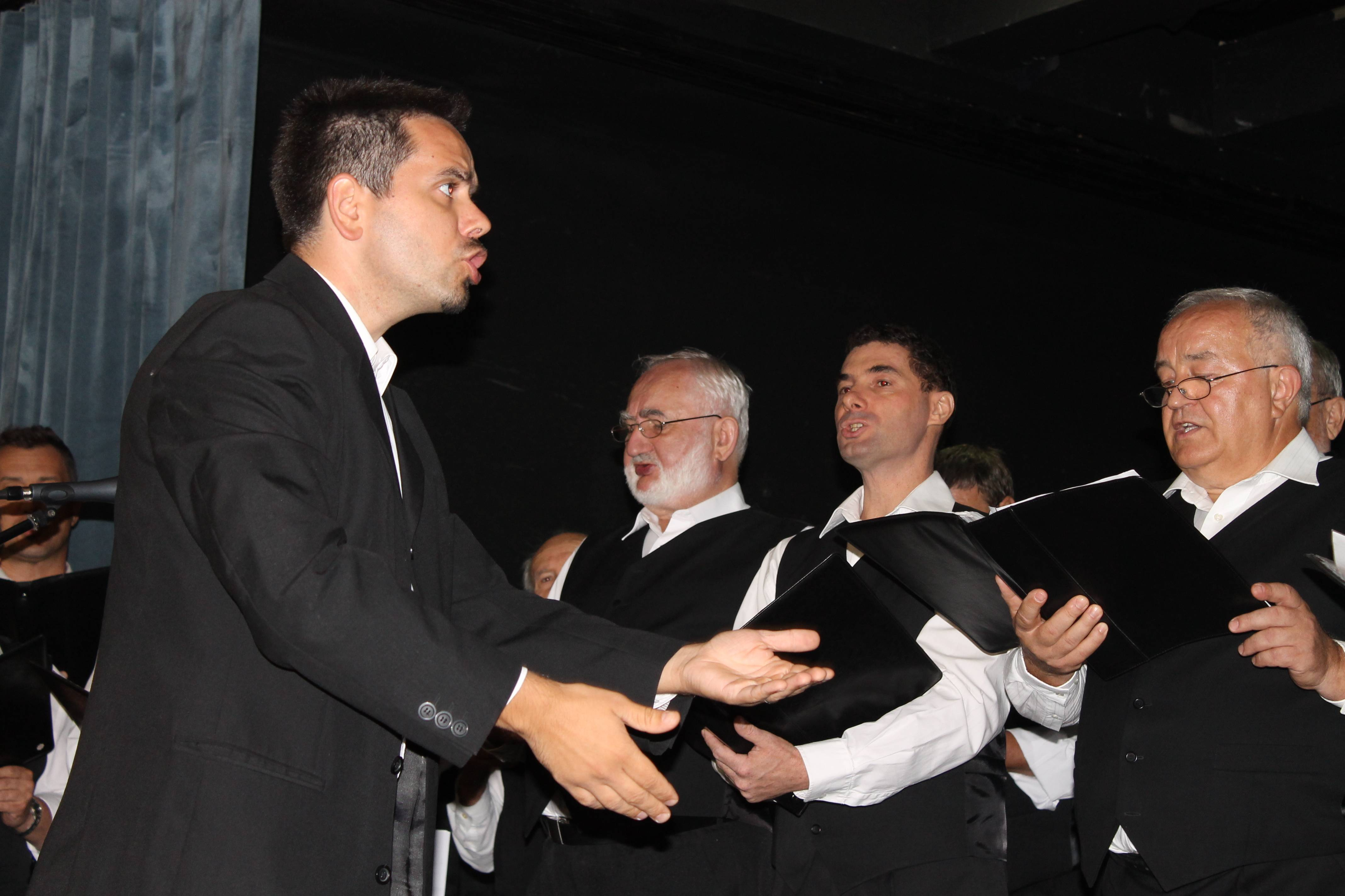 Fábián Attila karnagy és a férfikórus néhány tagja